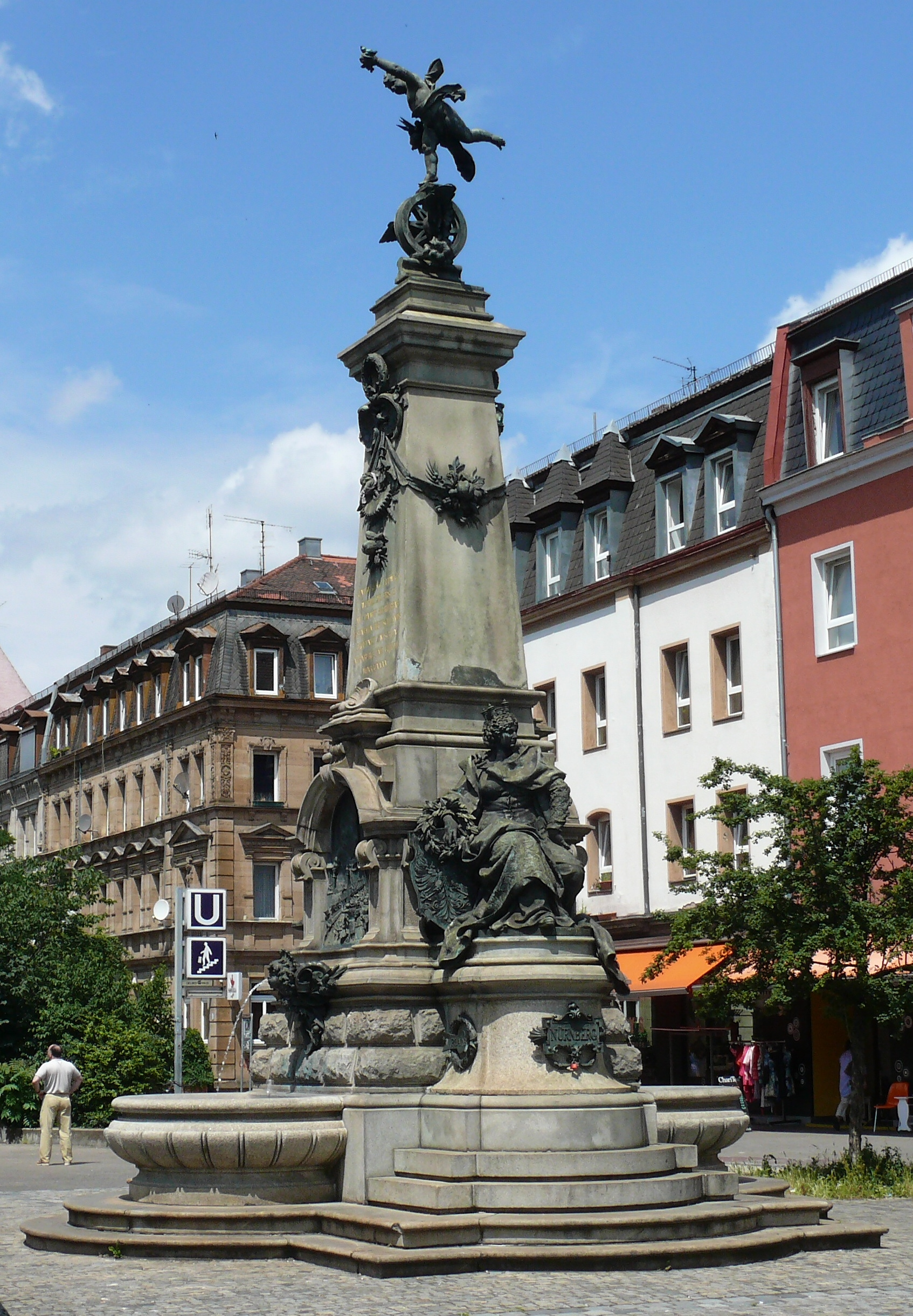 Denkmal zu Ehren der ersten Dampfeisenbahn Deutschlands zwischen Nürnberg und Fürth. Standort ist in der Fürther Straße in Nürnberg-Gostenhof über dem U-Bahnhof Bärenschanze.